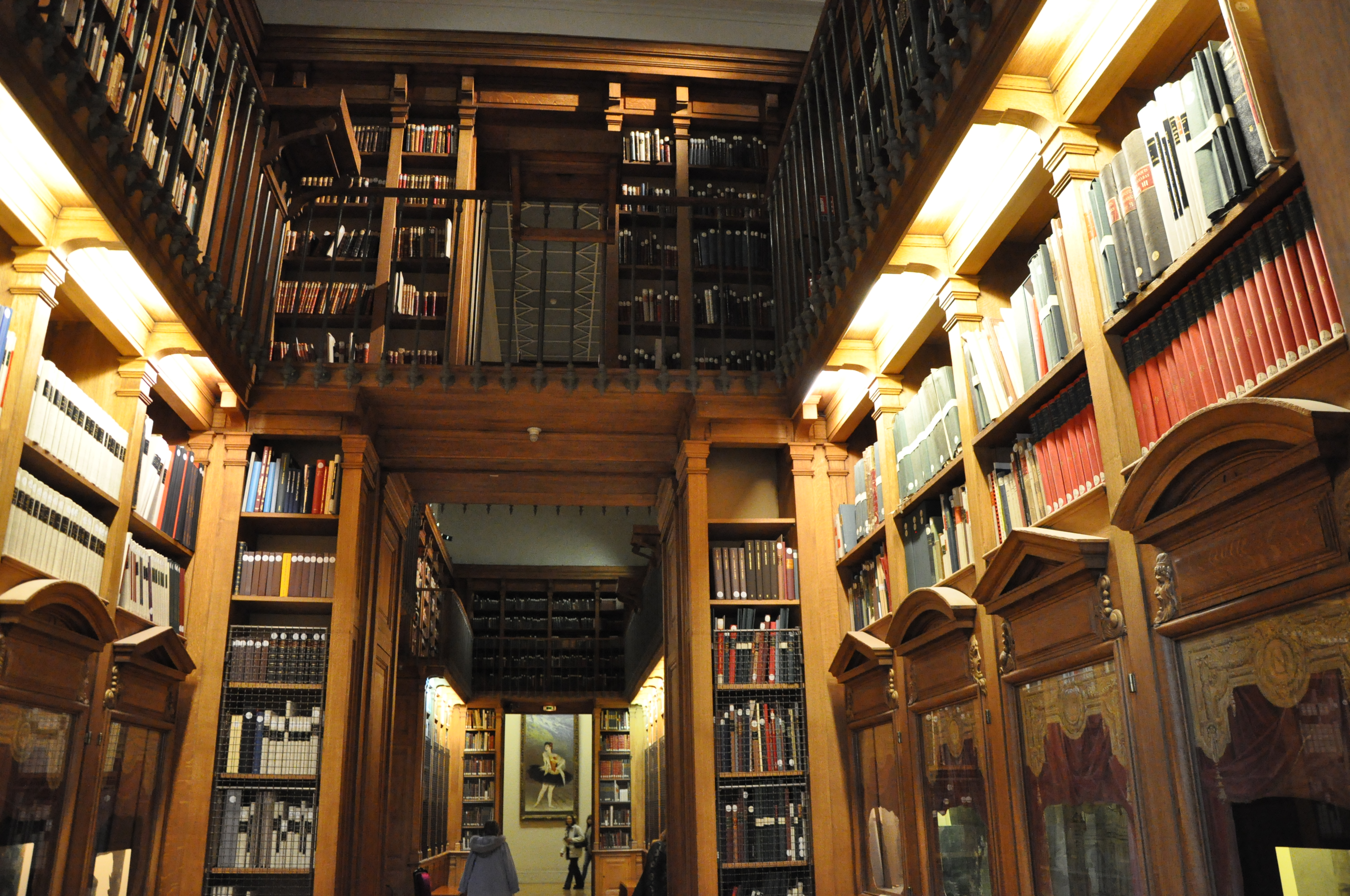 Bibliothèque de l'Opéra Garnier (Paris, France).